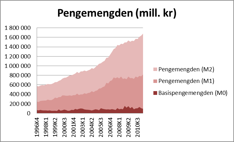 Pengemengden i Norge 1996 - 2011